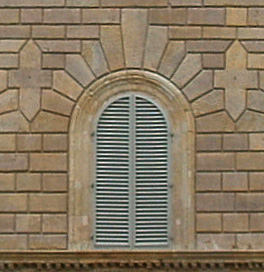 Palazzo gondi 111